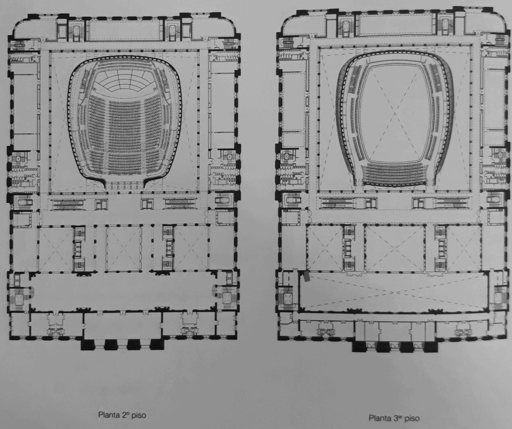 Proyecto Centro Cultural del Bicentenario: memorias, ideas, futuro